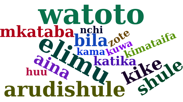 Kiswahili: Jalada hii ni Wingu wa maneno (tag cloud au word cloud). Mchoro ufanyiwa kwa R